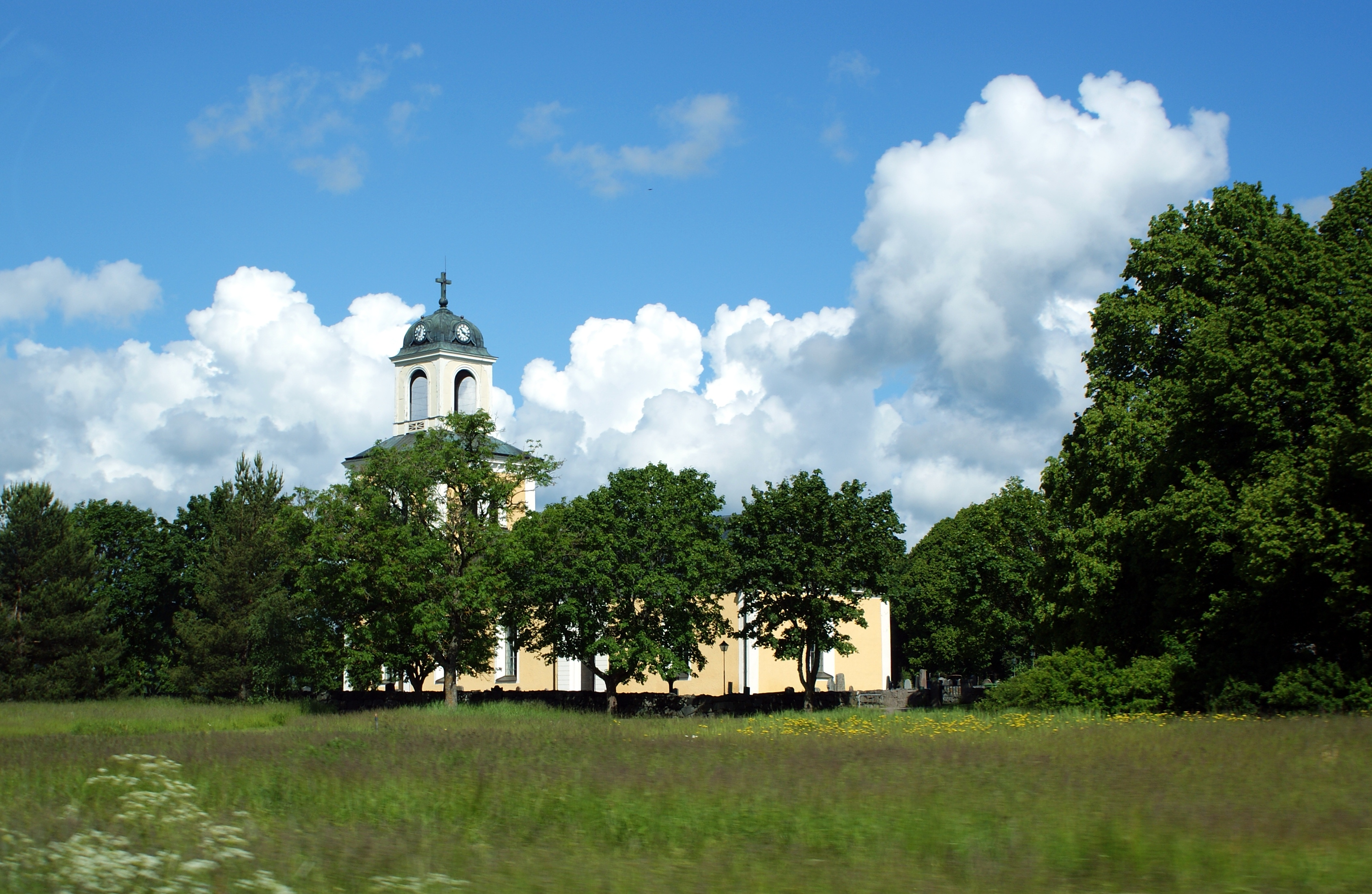 Börstils kyrka i Östhammars kommun